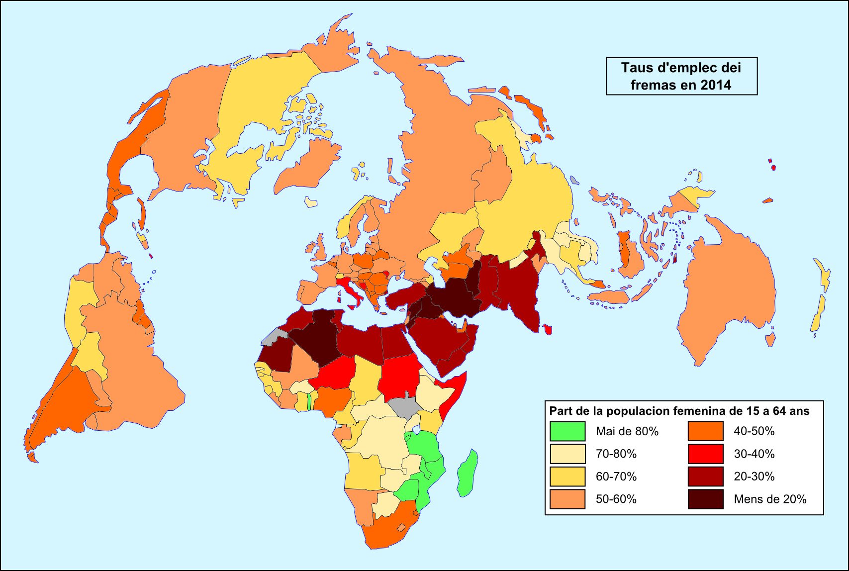 Taus d'emplec dei fremas en 2014.